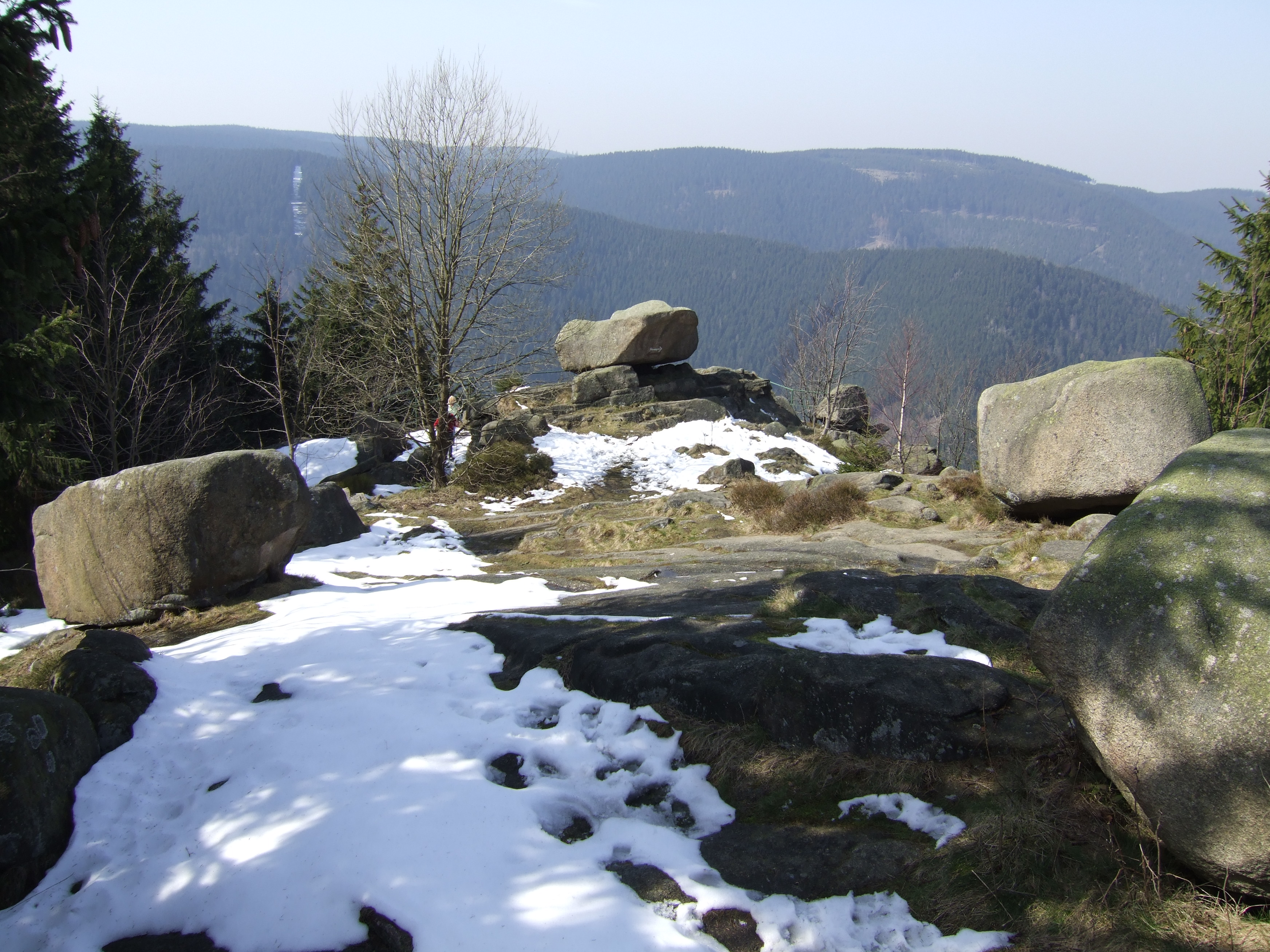 Die Kästeklippen mit Blick auf den gegenüberliegenden Eichenberg